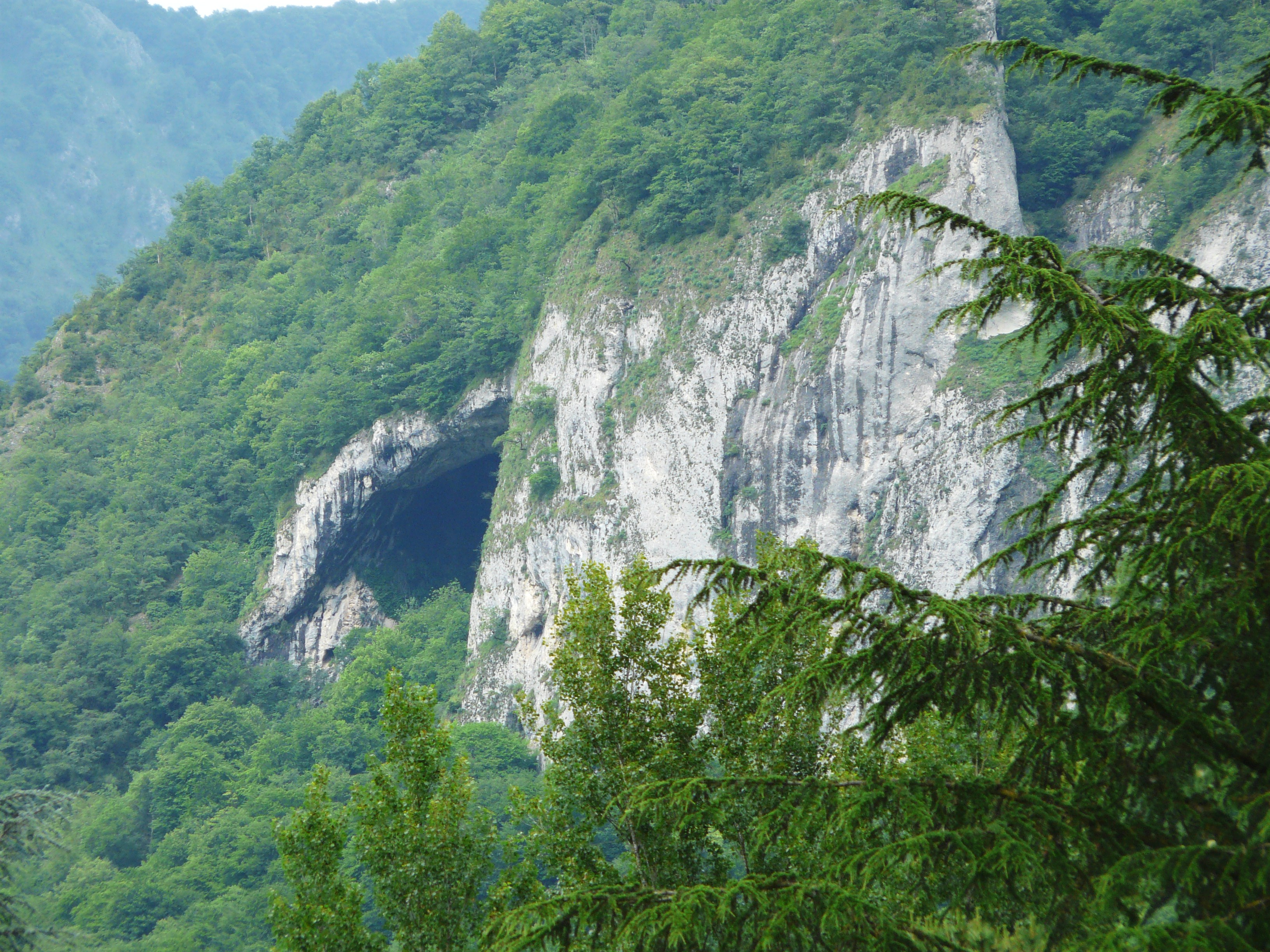 La grotte du Mail du Faucon, Eup, Haute-Garonne, France.